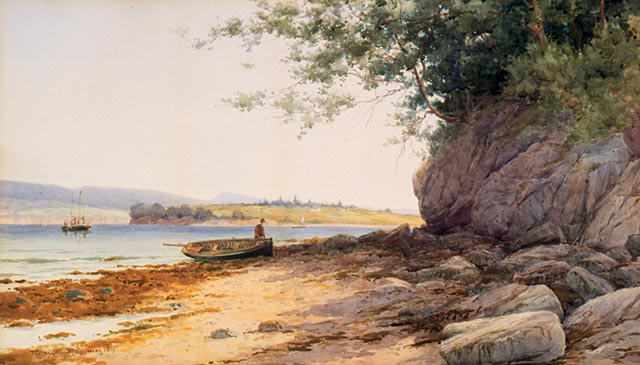 At Gaspé